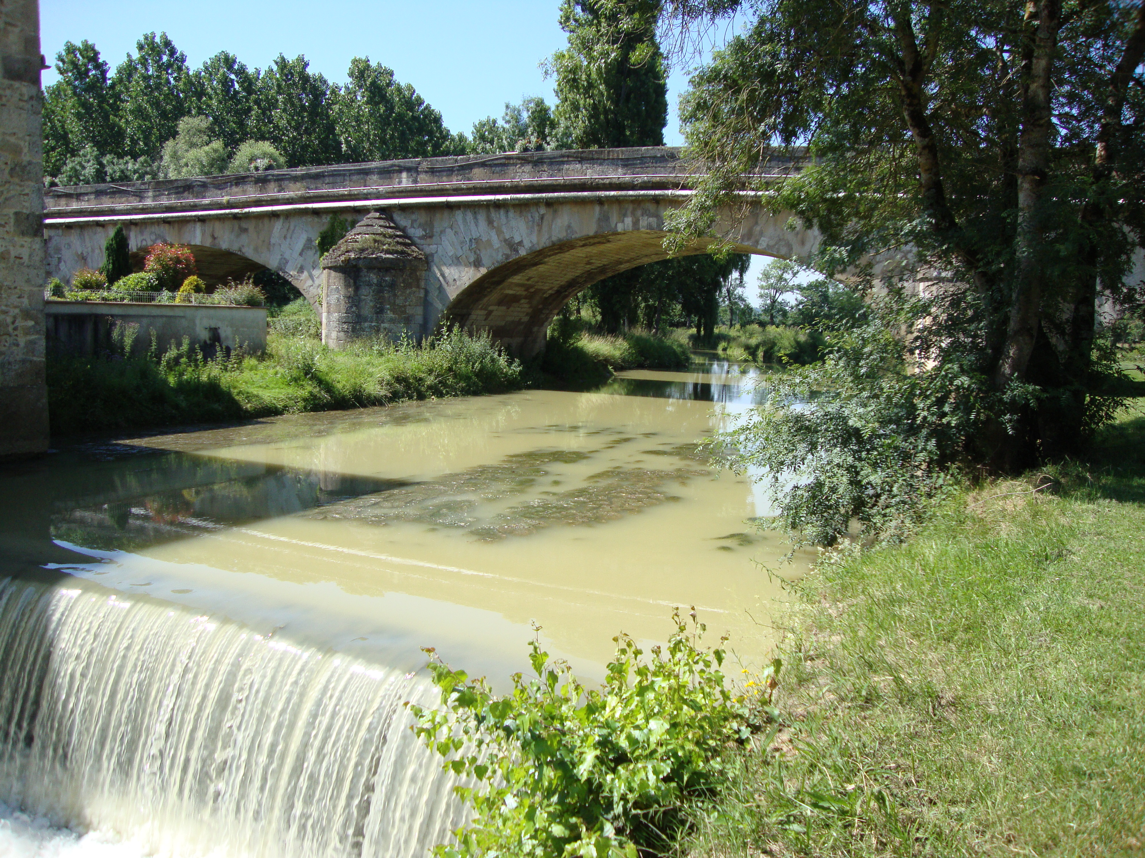 Gimont (Gers, Fr) la Gimone, pont et barrage.